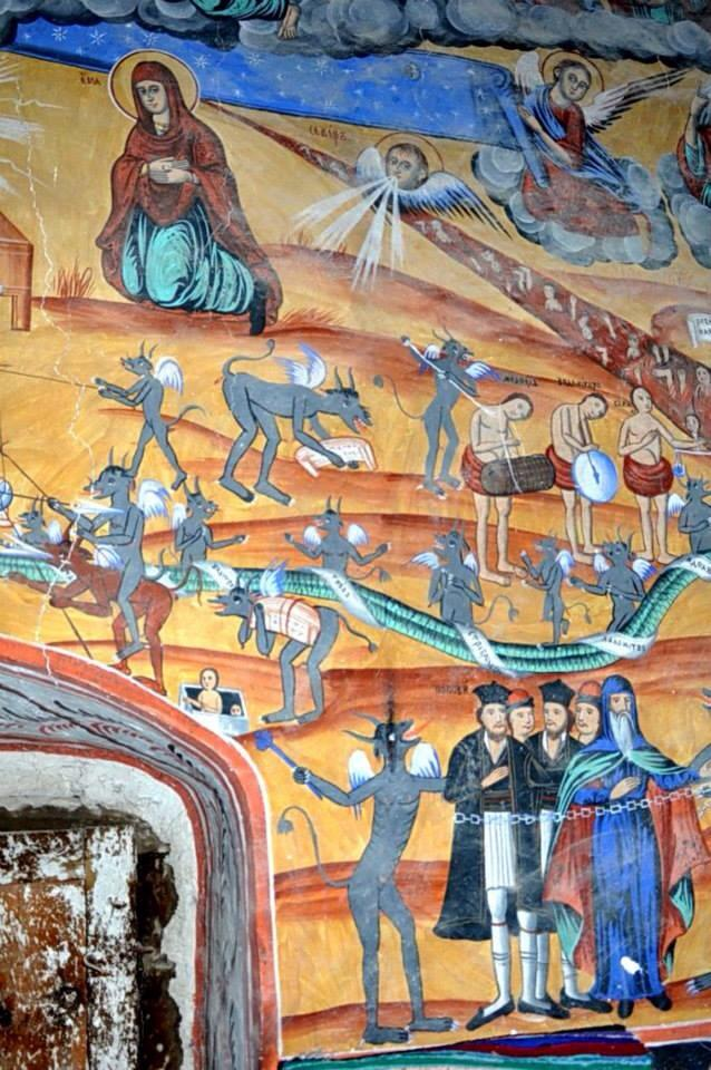 Бешиште, црква Св. Параскева